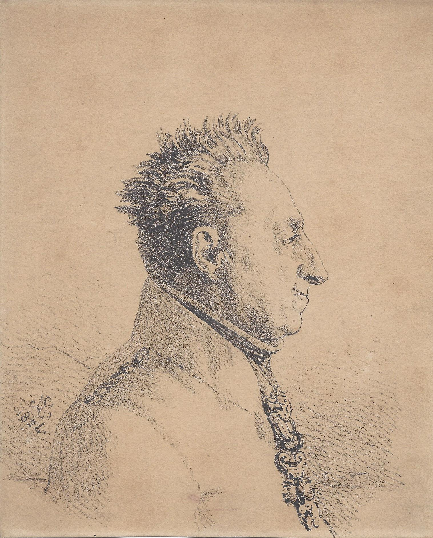 Ferdinand Karl von Österreich-Este, Lithographie signiert L.M. ligiert, 1824.